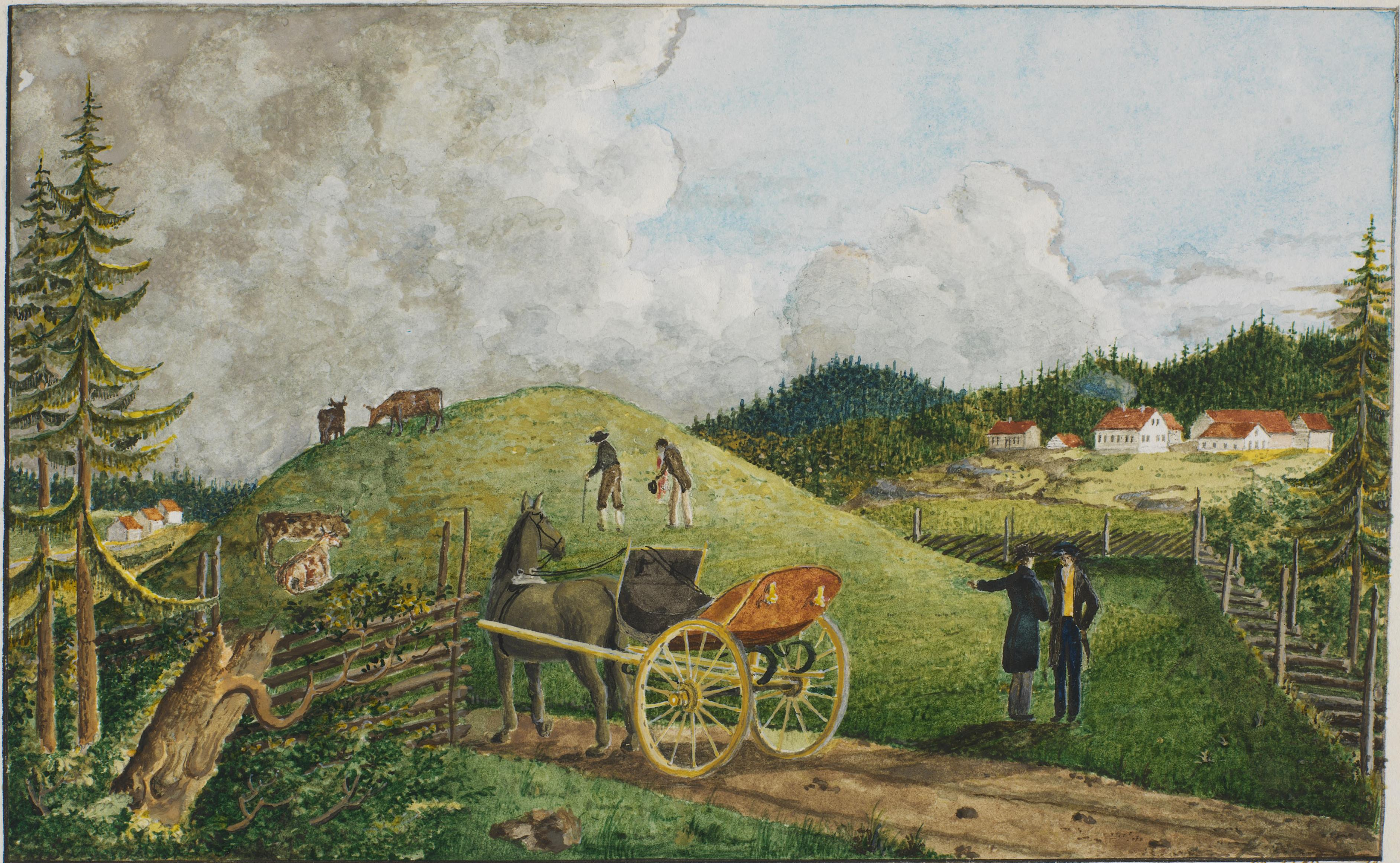 Illustrasjon hentet fra et privatarkiv i Nasjonalbiblioteket med tittelen "Halfdan Svartes Høi paa Gaarden Stene i Ringeriget" av Peter Andreas Brandt.